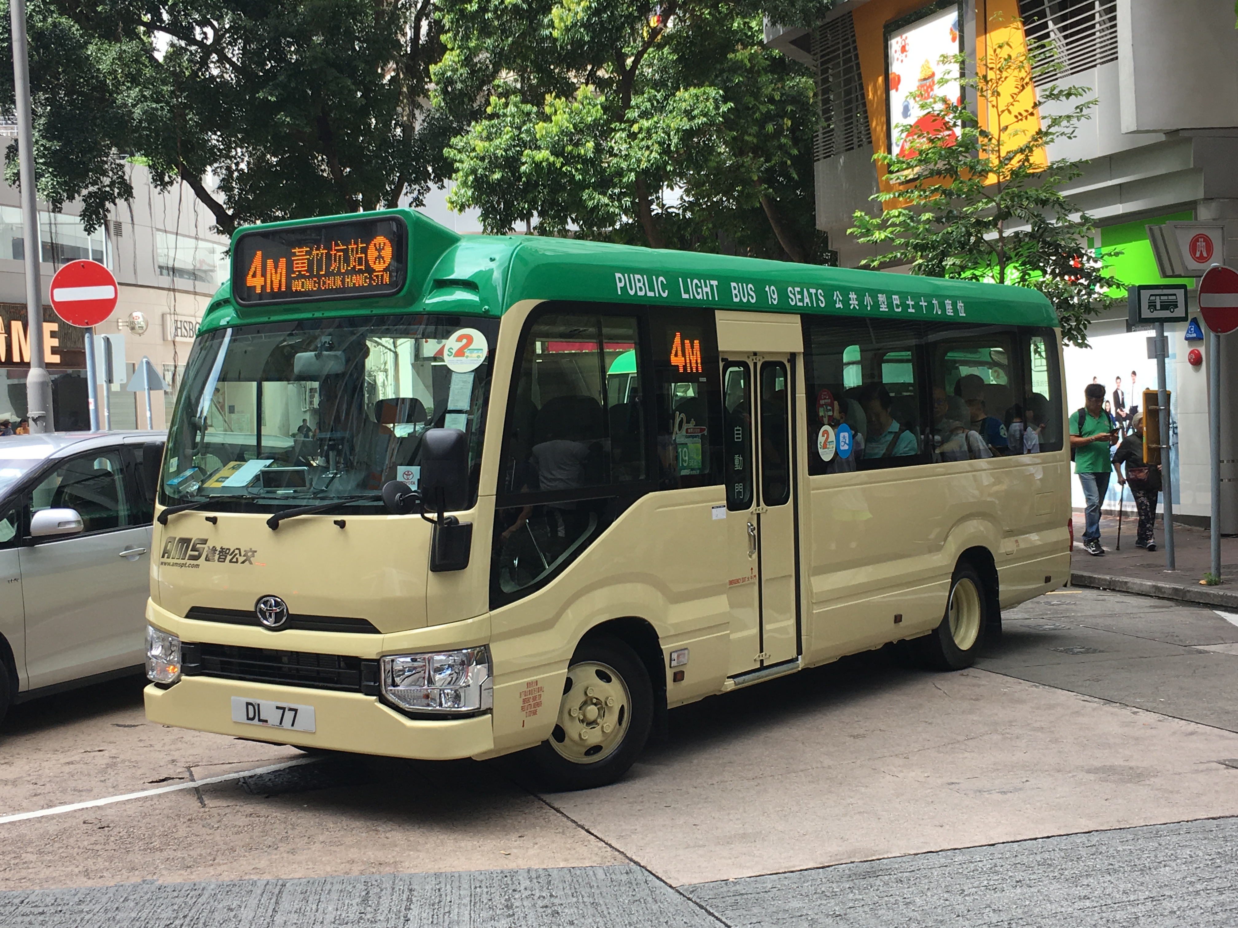 中文（香港）: This photo is taken in Aberdeen.